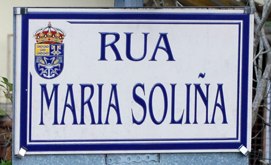 Rúa María Soliña no Ponto, Concello de Narón A Coruña Galiza Spain